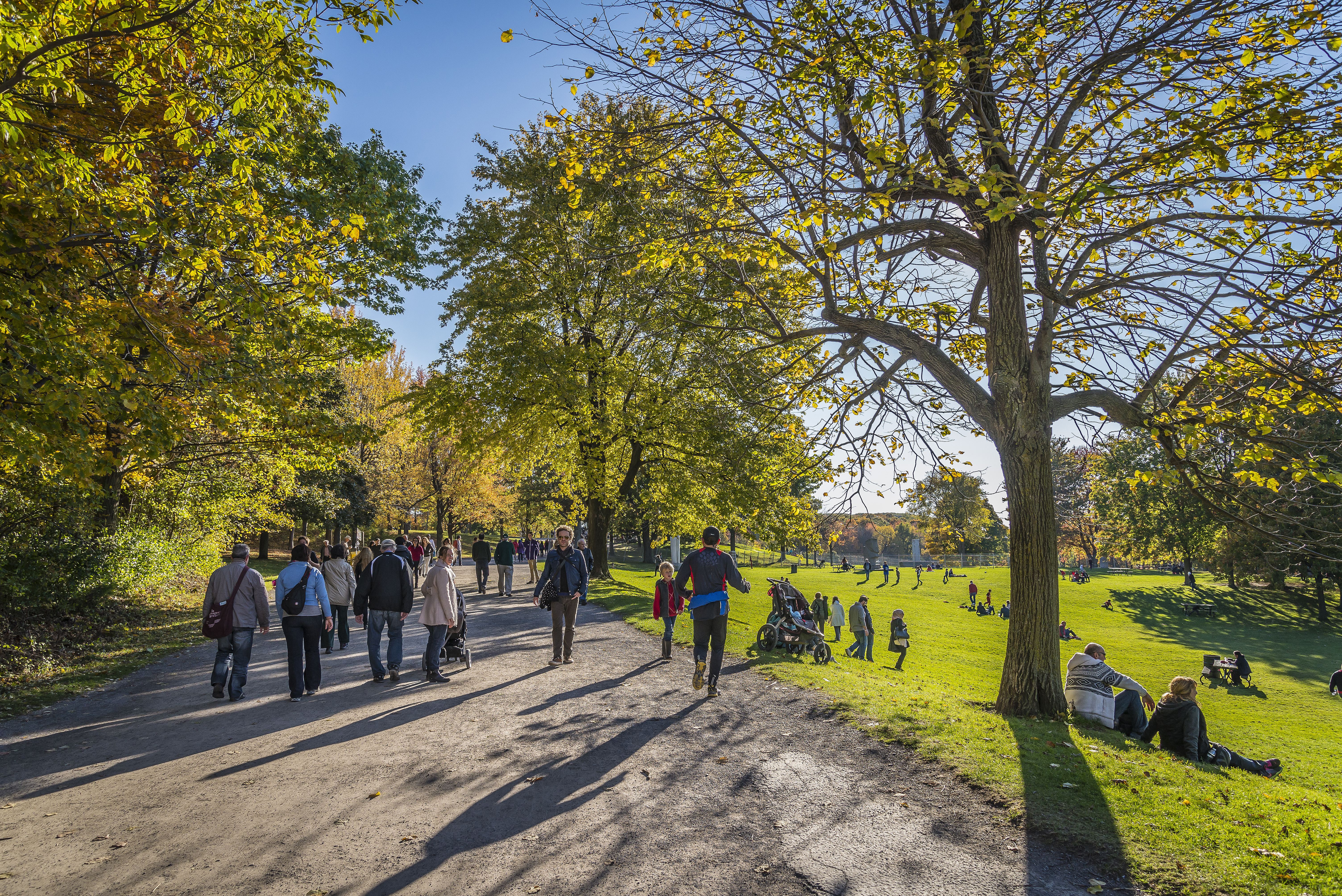 Le parc du Mont-Royal est l'un des espaces verts les plus importants de Montréal. Par conséquent, il protège le mont Royal de développements urbains plus étendus. Le parc, créé en 1876, est considéré comme étant la plus ancienne aire protégée du Québec.